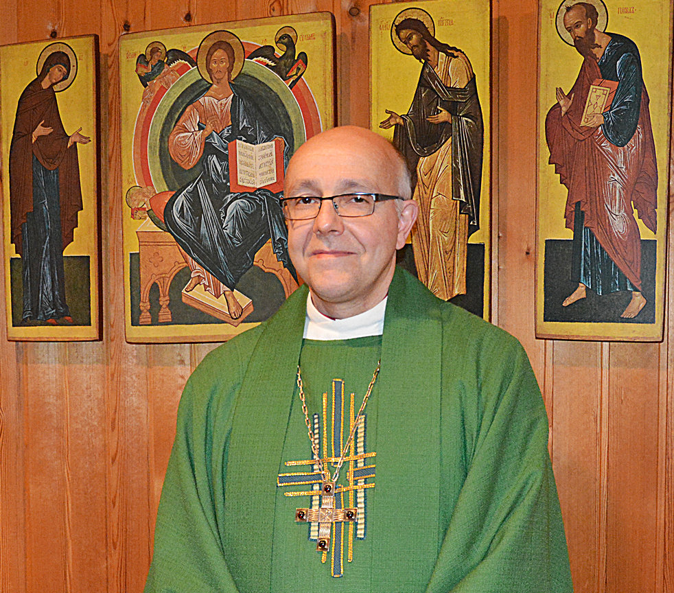 Bischof Hans-Jörg Voigt D.D. (Selbständige Evangelisch-Lutherische Kirche - SELK)